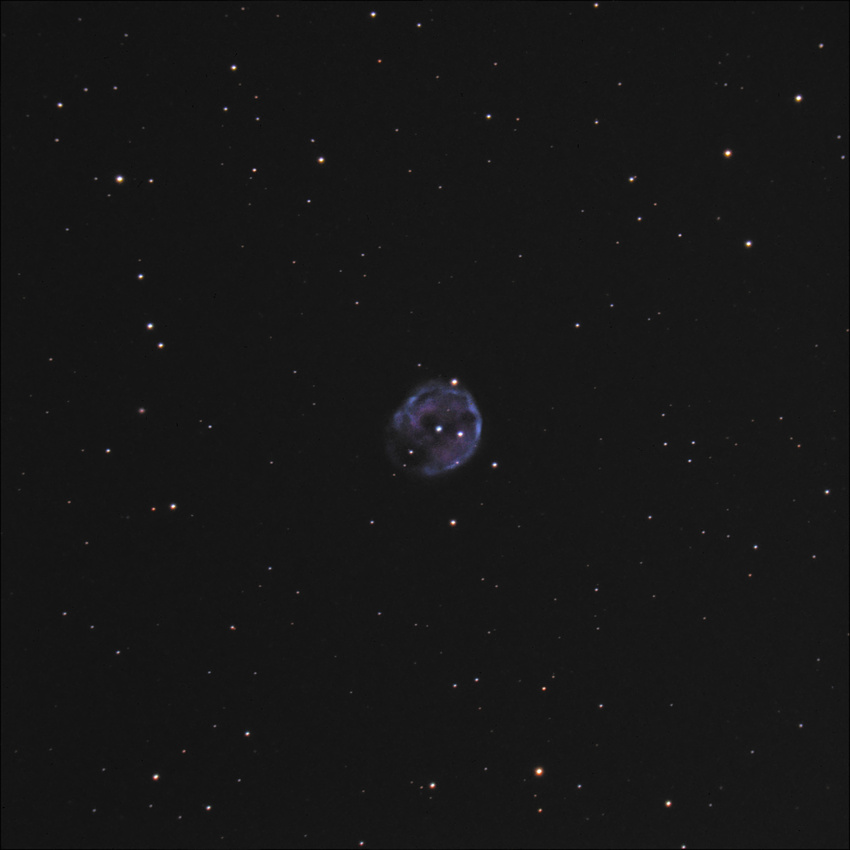 NGC 246 in Cetus